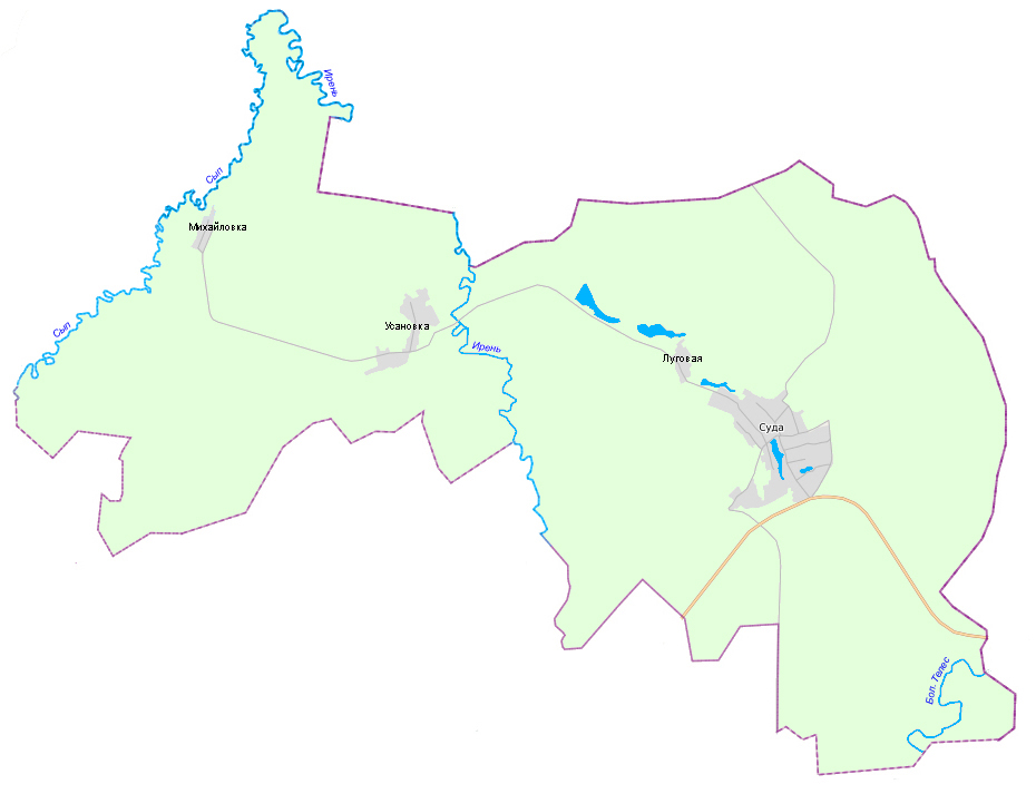 Территория Судинского сельского поселения